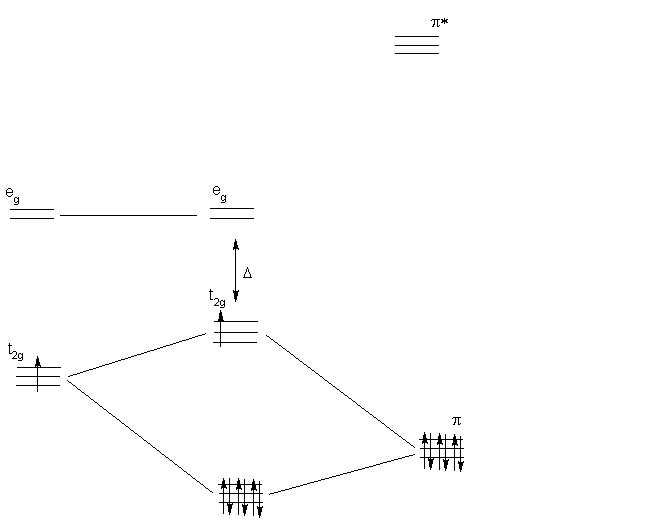 Effetto di un ligando basico π